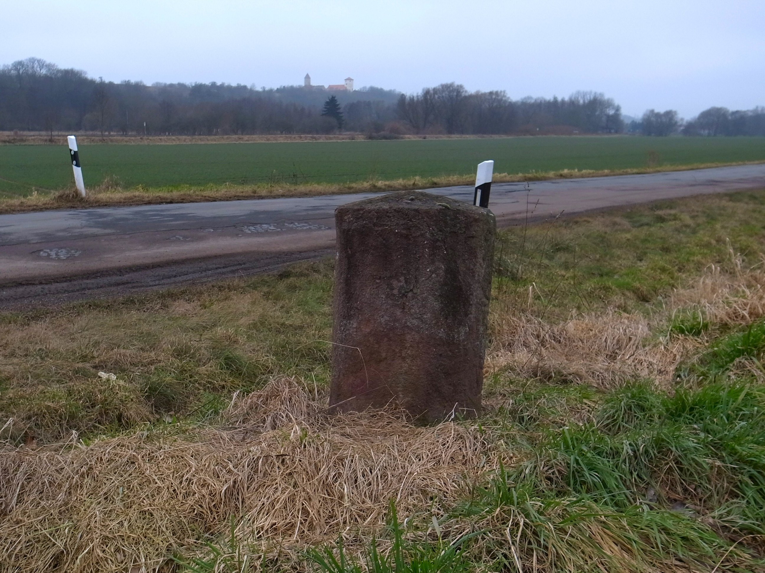 Sandersleben in Richtung Freckleben, Meilenstein, Anhaltischer Rundsockelstein